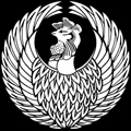 「鳳凰丸」紋（染抜）